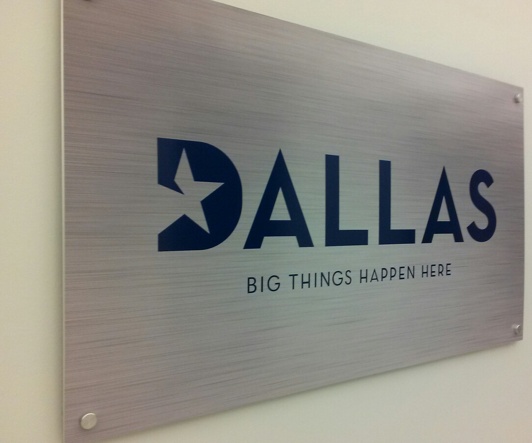 El lema turístico de Dallas, en la Oficina de Turismo y Convenciones